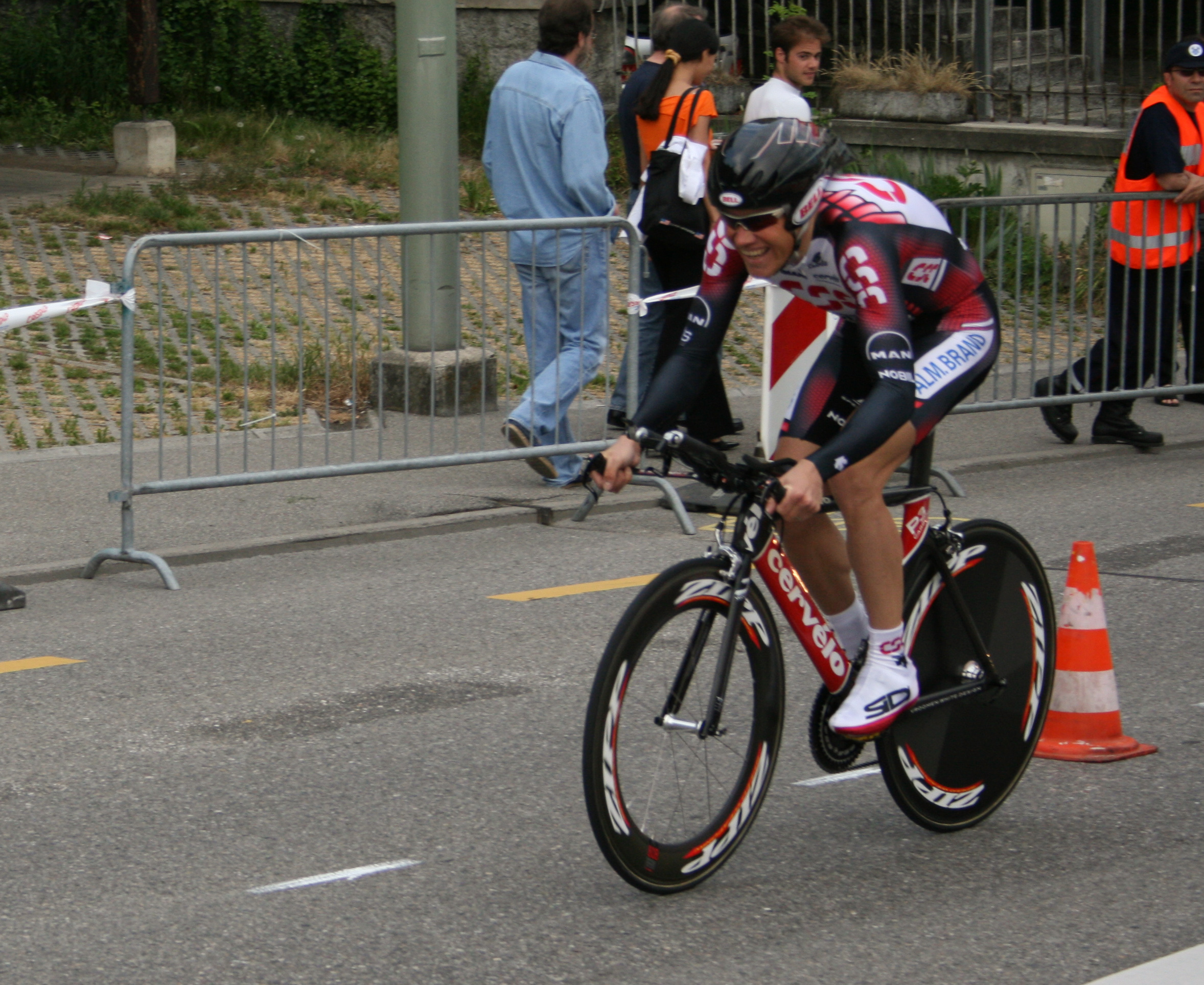 Michael_Blaudzun prologue du Tour de Romandie 2007